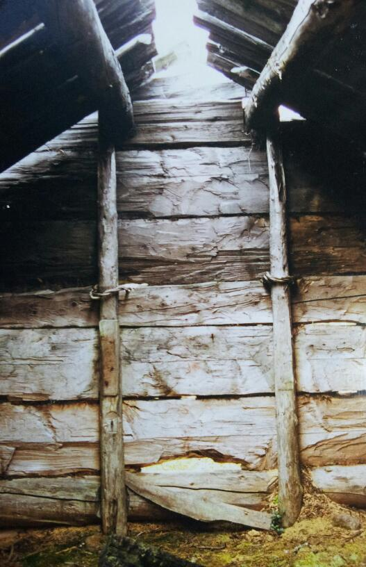 Interiör till skogssamisk timrad kåta från 1887. Belägen strax utanför Purnu i Gällivare skogssameby, Sverige. Byggd av skogssamen Pehr Pehrsson, Purnu. Tak av näver och torv. Väggar av yxkluvet halvtimmer. Mitt på golvet eldstad och rököppning mellan de två längsgående åsarna i taket. Stödjande stolpar fästade med vidjor i timmerväggarna. Inristat signaturen PPS (Pehr Pehrsson) 1887 i timmerstock (ej med på bilden). Bilden är tagen före hans barnbarn Hans Persson renoverade kåtan med gamla hantverksmetoder på slutet av 1990-talet. Kåtan finns dokumenterad som traditionellt viste för Purnu-sitan (gruppen) i Ernst Mankers bok Skogslapparna i Sverige.